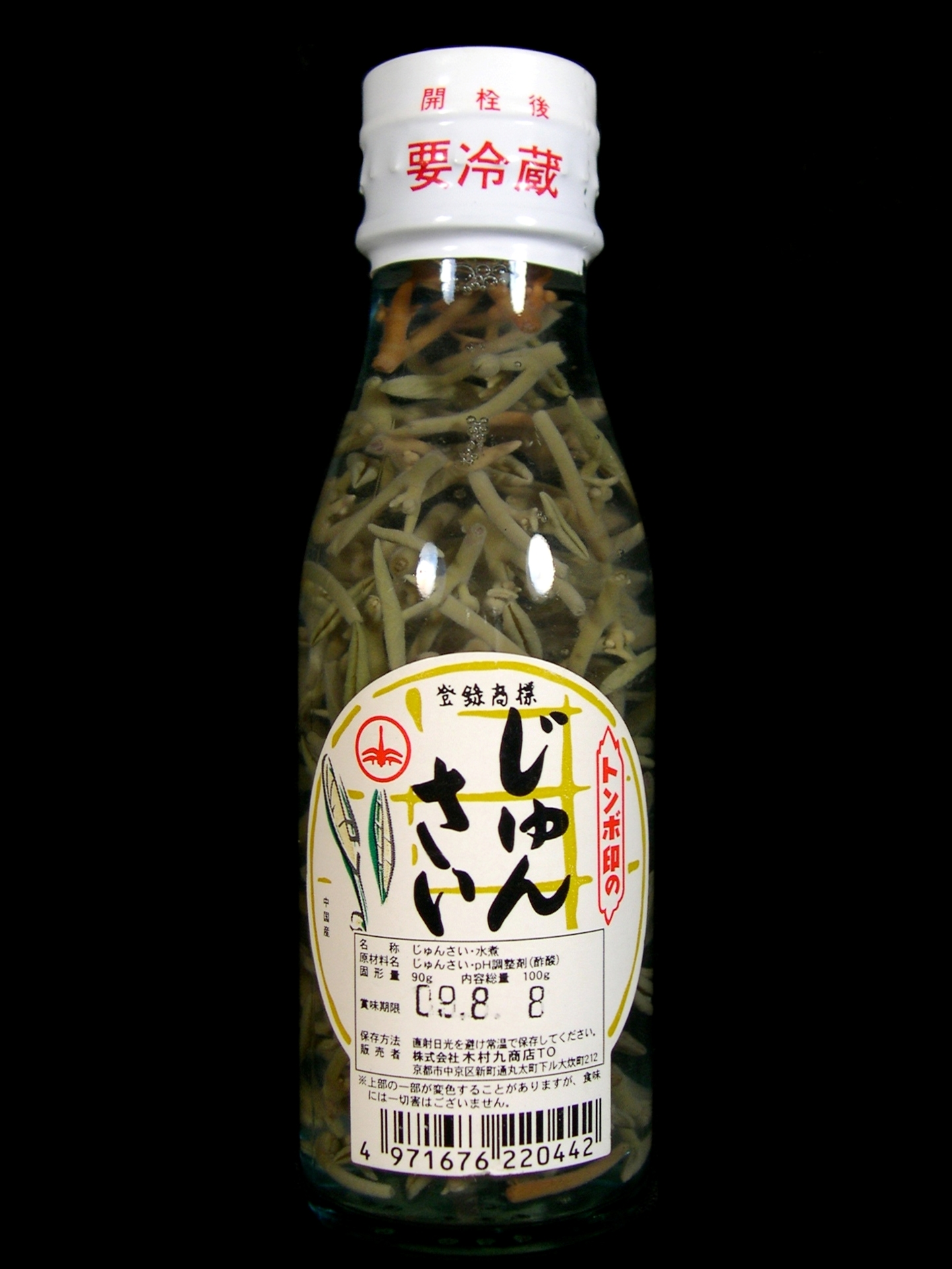 瓶入りのじゅんさいの水煮 （トンボ印のじゅんさい：固形量 90g、内容総量 100g、賞味期限 09.8.8、株式会社 木村九商店、中国産）